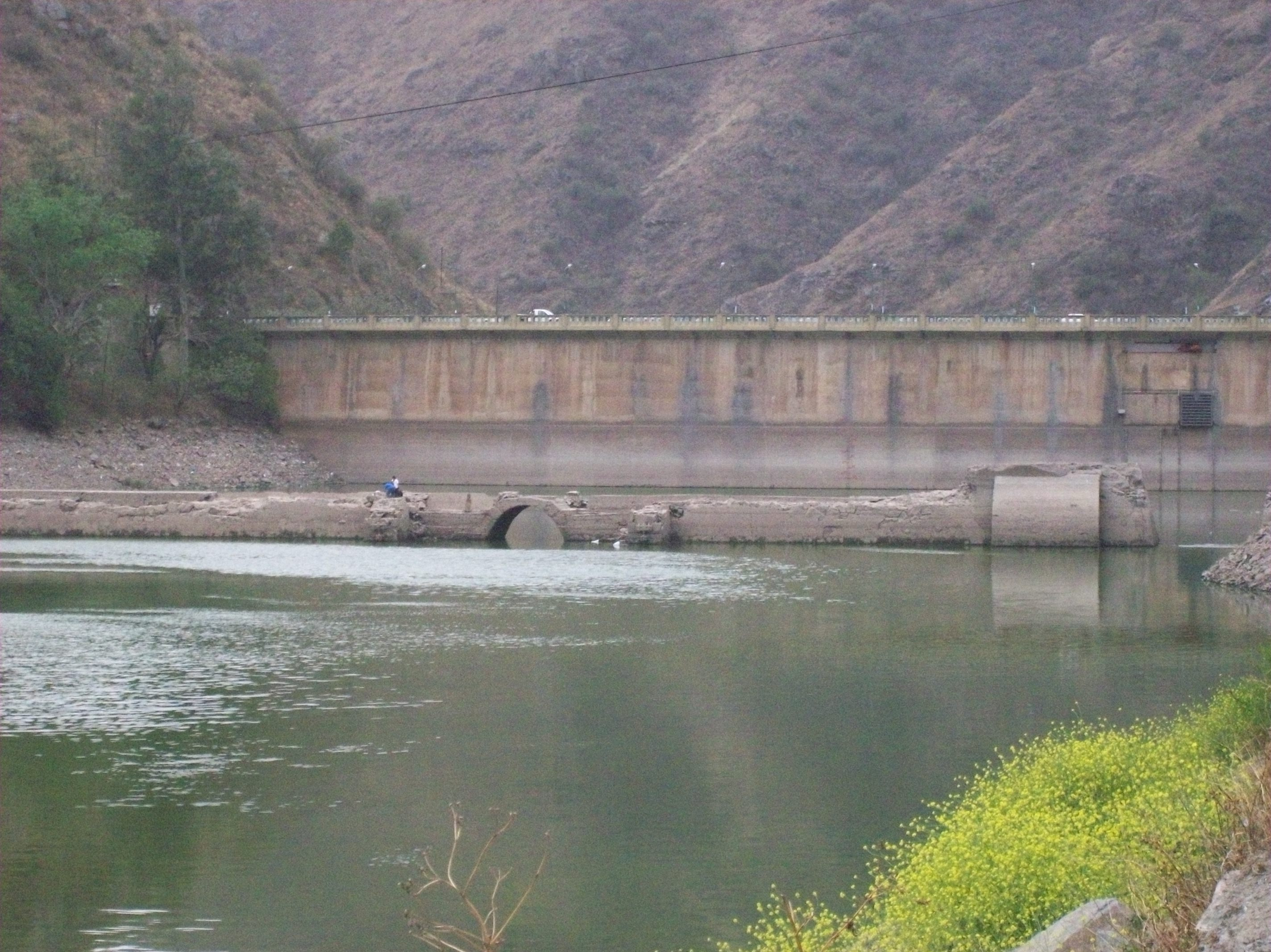 Viejo y nuevo Dique San Roque, en la provincia de Córdoba, Argentina.